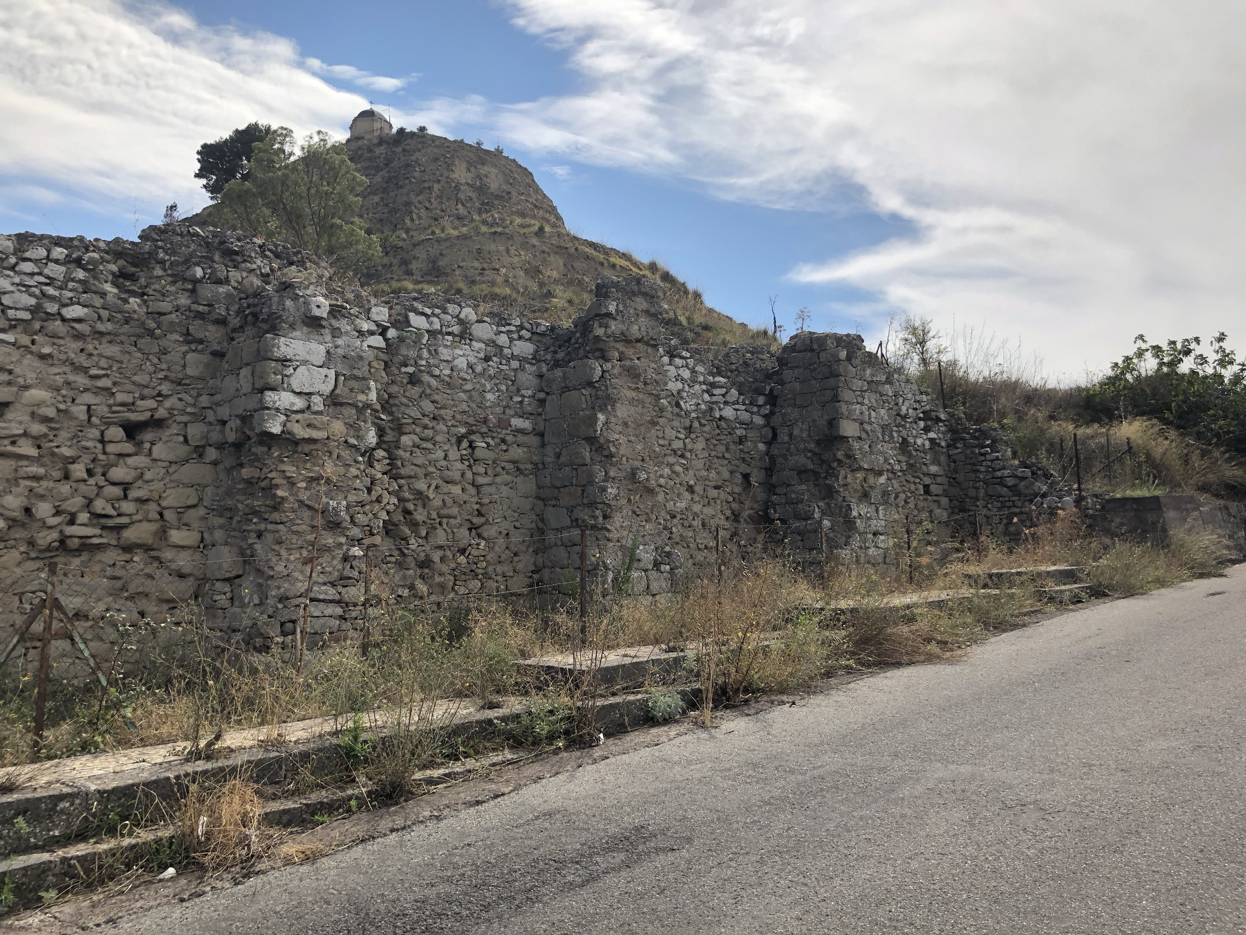 Panneria